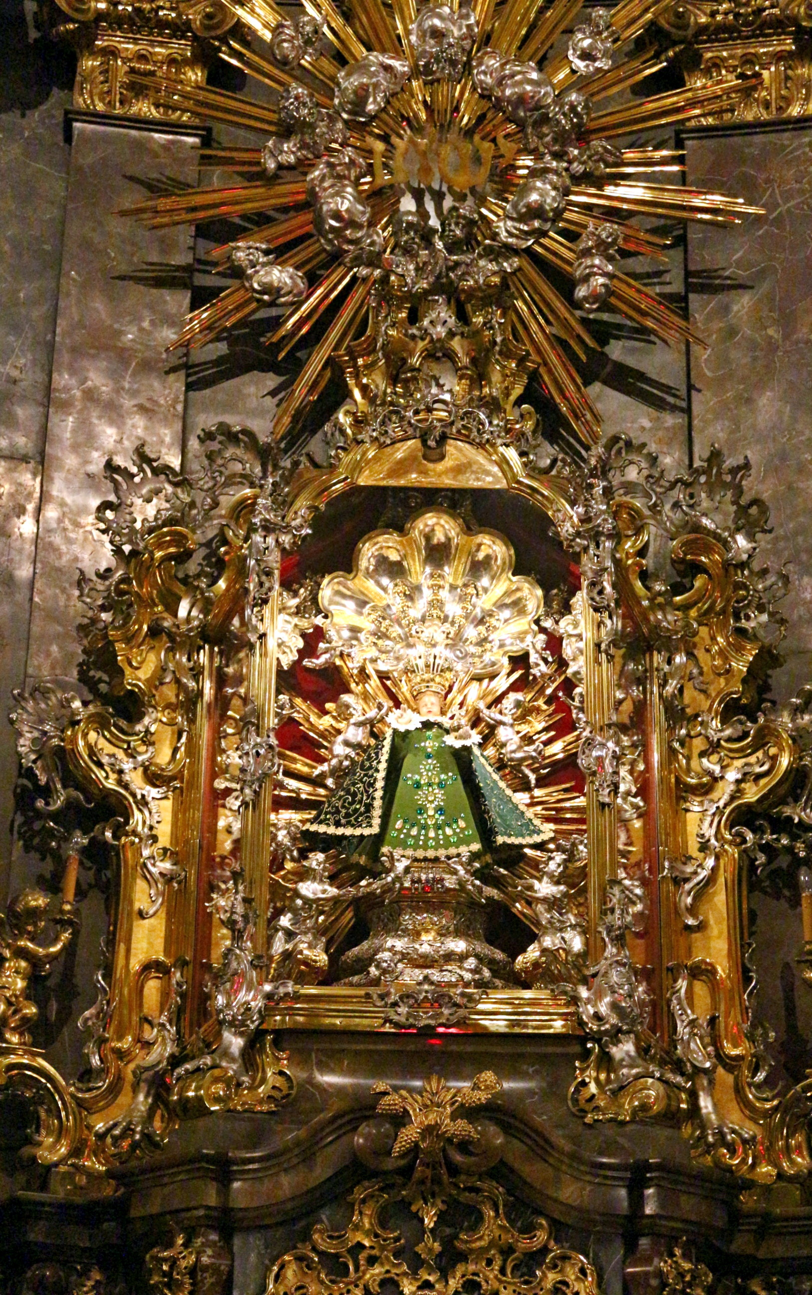 Kostel Panny Marie Vítězné a sv. Antonína Paduánského na Malé Straně v Praze